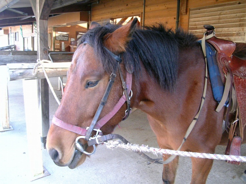 木曽駒 Kiso-Pony